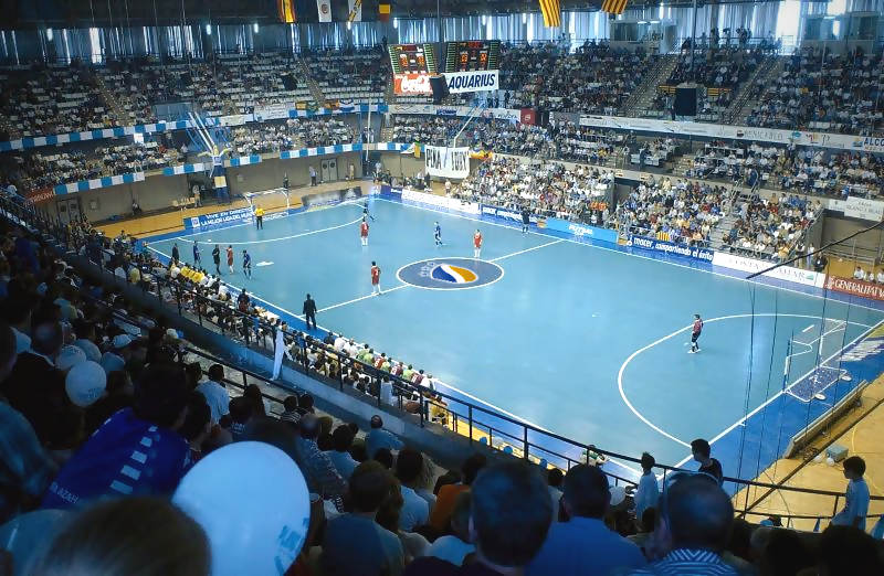 Pabellón Ciutat de Castelló. Final Uefa Futsal Cup. Playas de Castellón 5-1 al Action 21 Charleroi